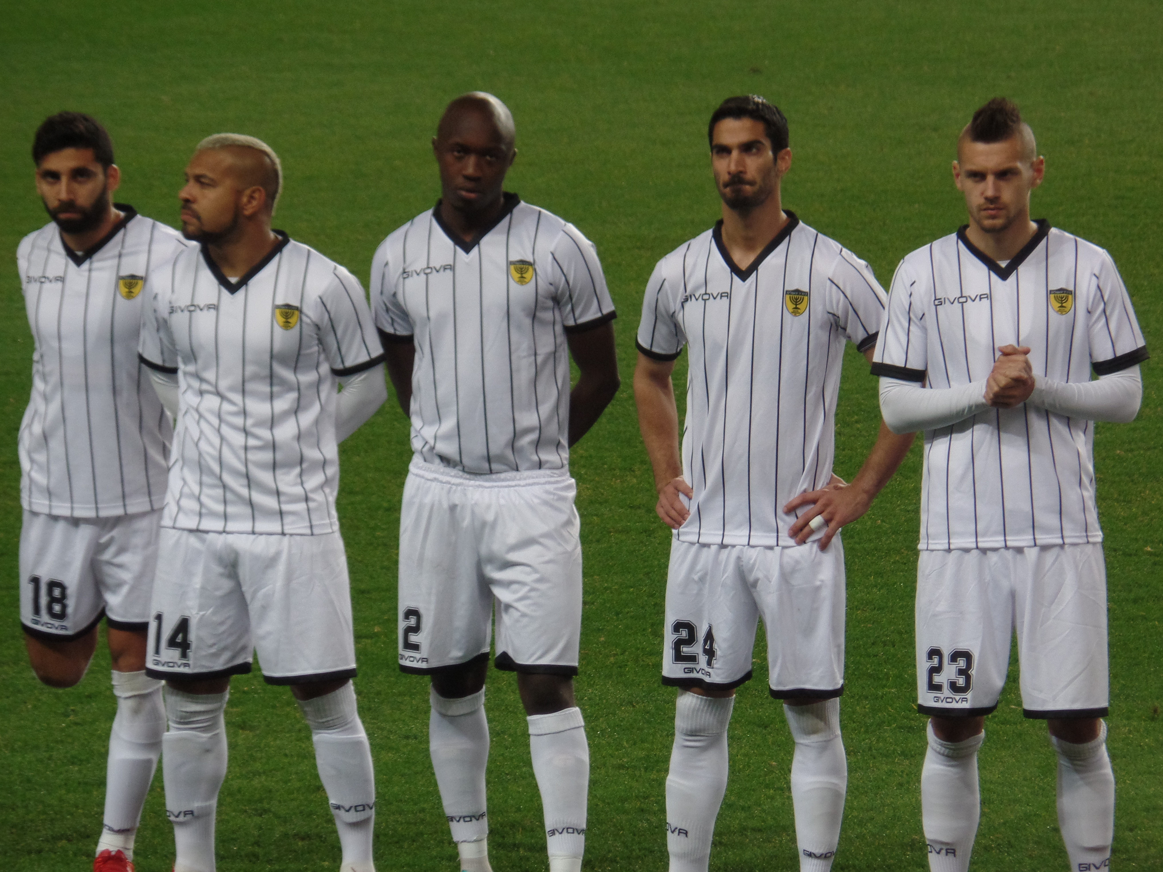 שחקני בית"ר ירושלים, 2018